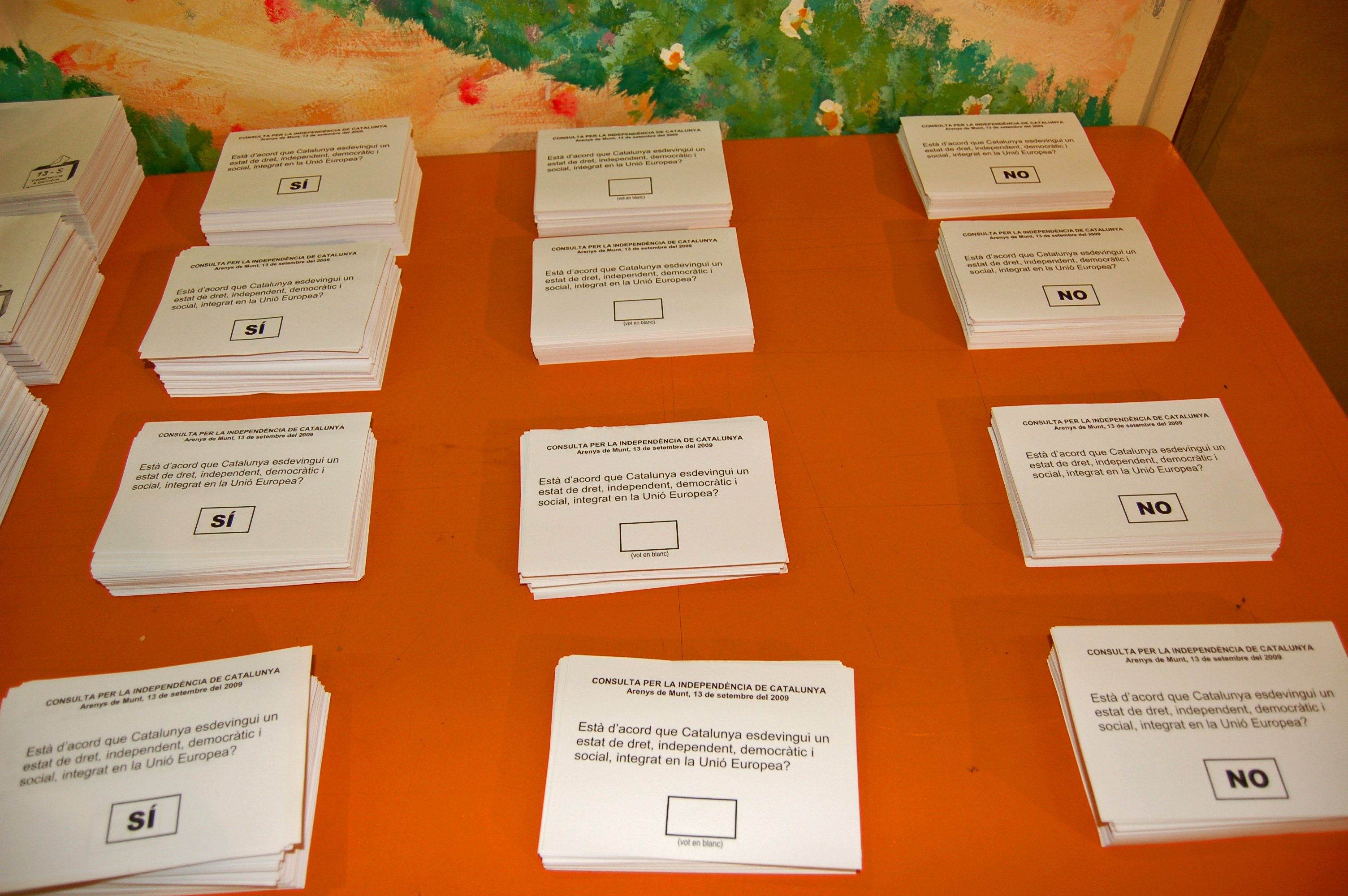 Les diferents butlles amb les diferents opcions a la Consulta per la independència de Catalunya a Arenys de Munt.